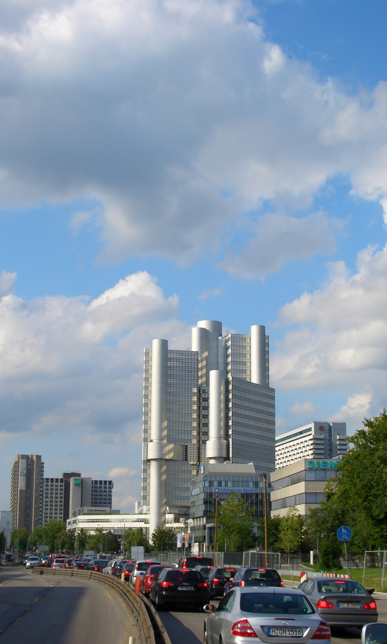 Arabellapark von Süden (Richard-Strauss-Straße)